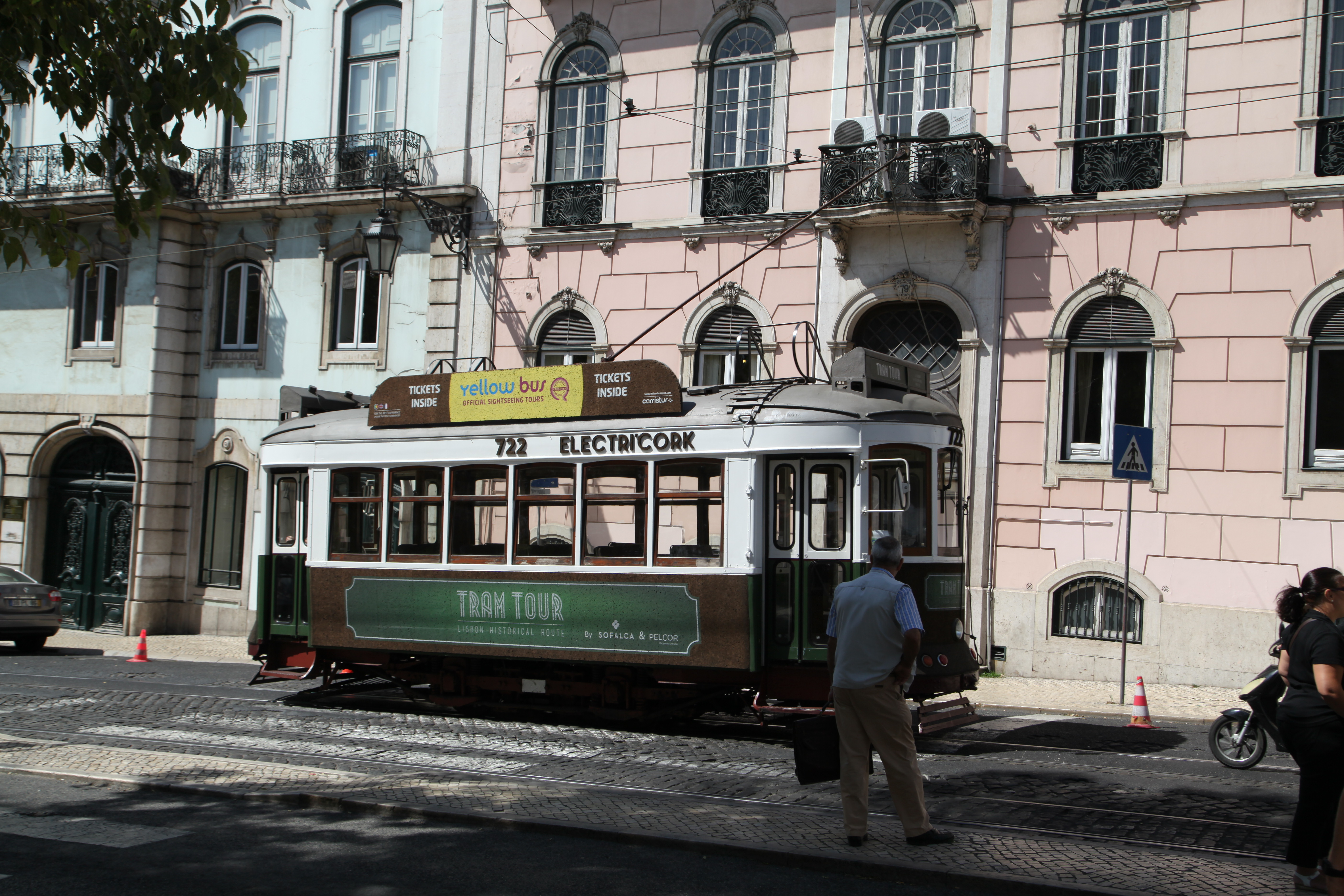 Lisbonne